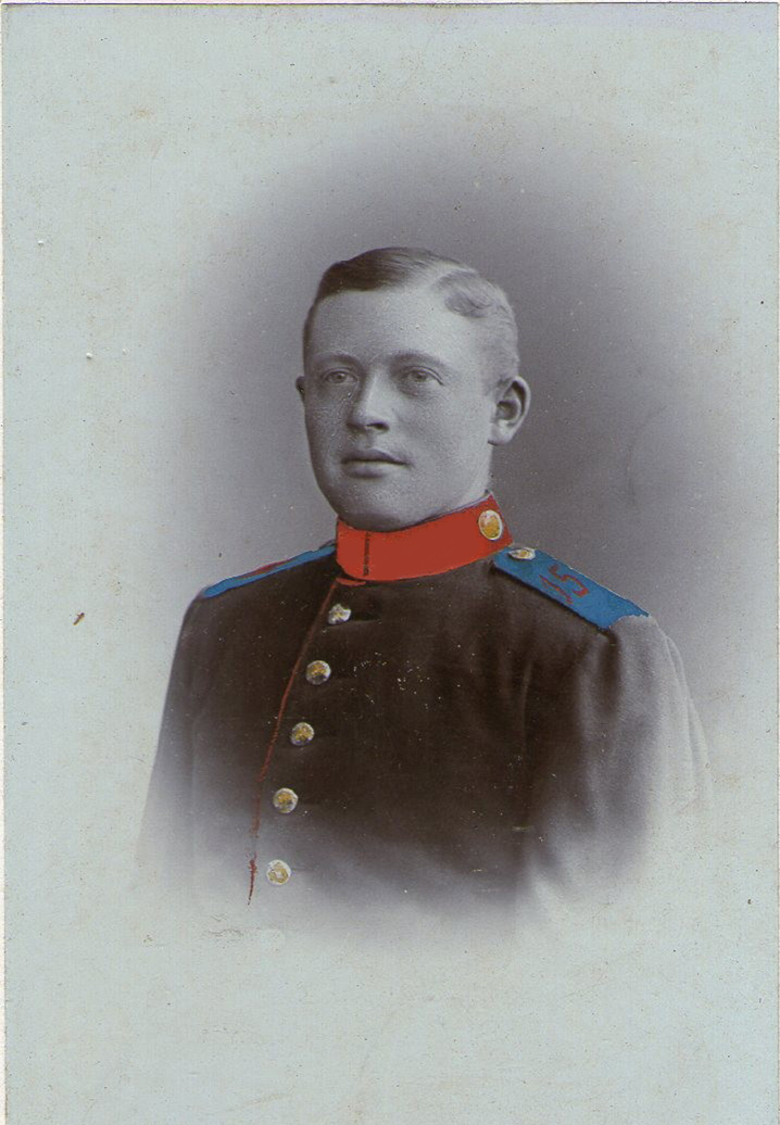 Angehöriger des Infanterie-Regiments Nr. 15 (2. Westfälisches) - Bei der Person handelt es sich wahrscheinlich um Heinrich Tarner aus Bokel (geb. 1882)